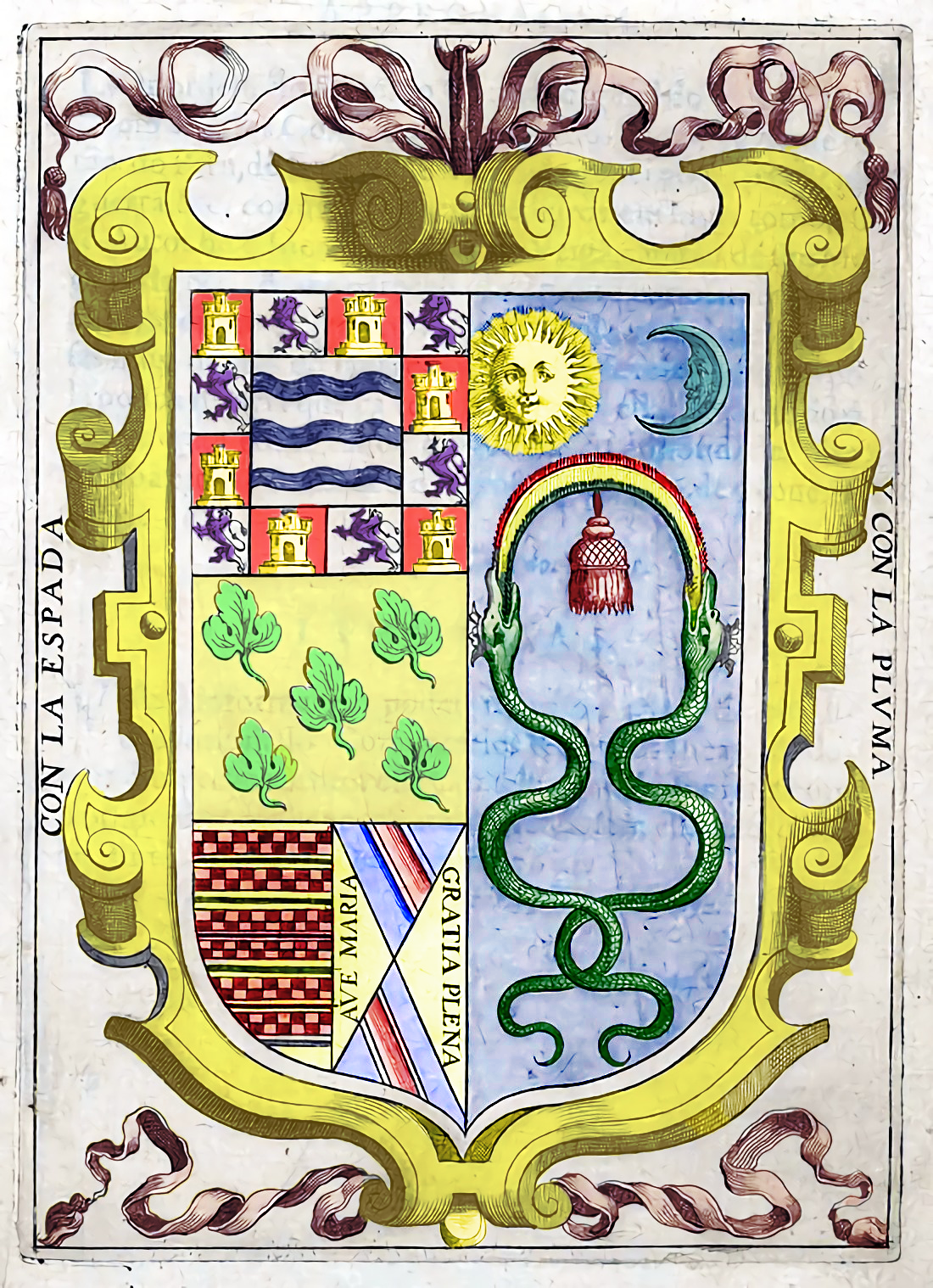 Coloreo propio basado en un diseño de 1609